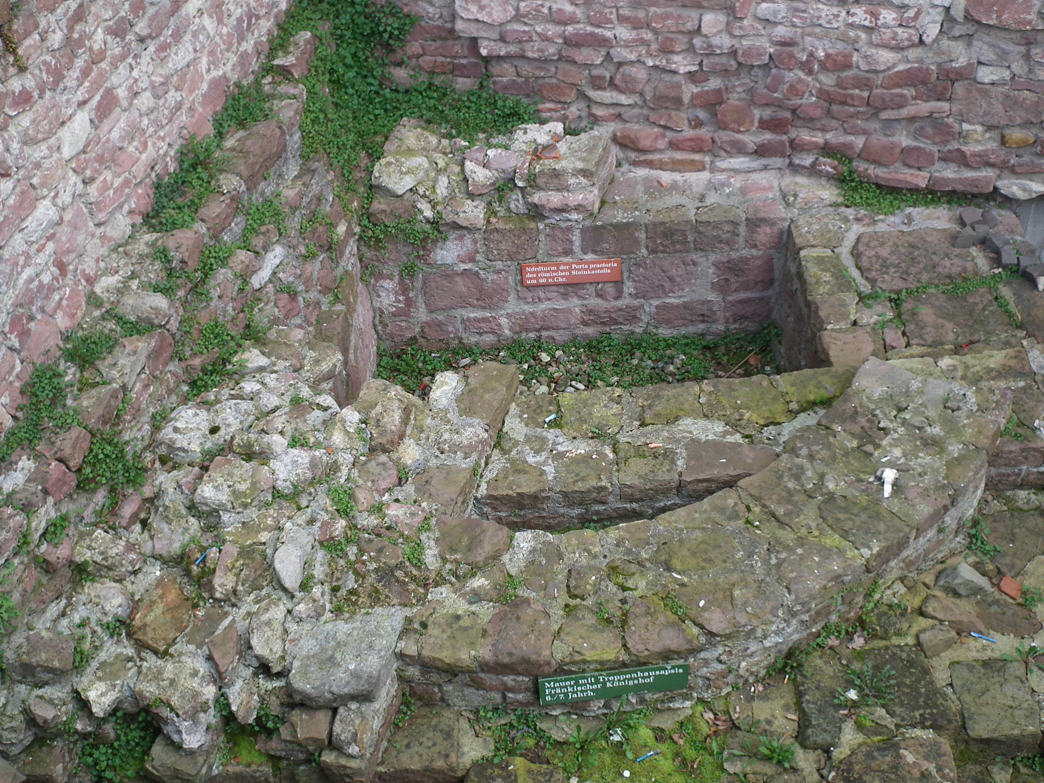 Nordturm der Porta praetoria des römischen Steinkatells um 90 nach Christus, im Vordergrund Mauer mit Treppenhausapsis Fränkischer Königshof 6./7. Jahrhundert, fotografiert in Ladenburg (Baden-Württemberg, Deutschland)